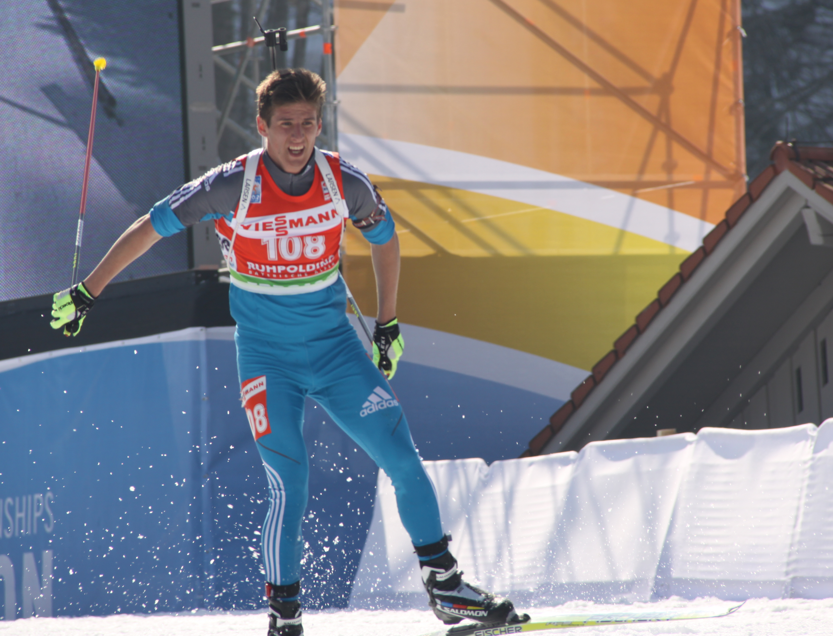 Milan Szabo HUN